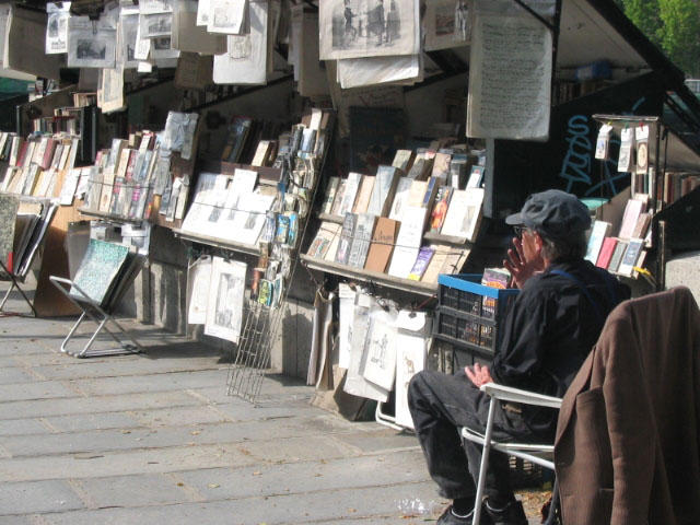 Bouquiniste Paris Bords de Seine